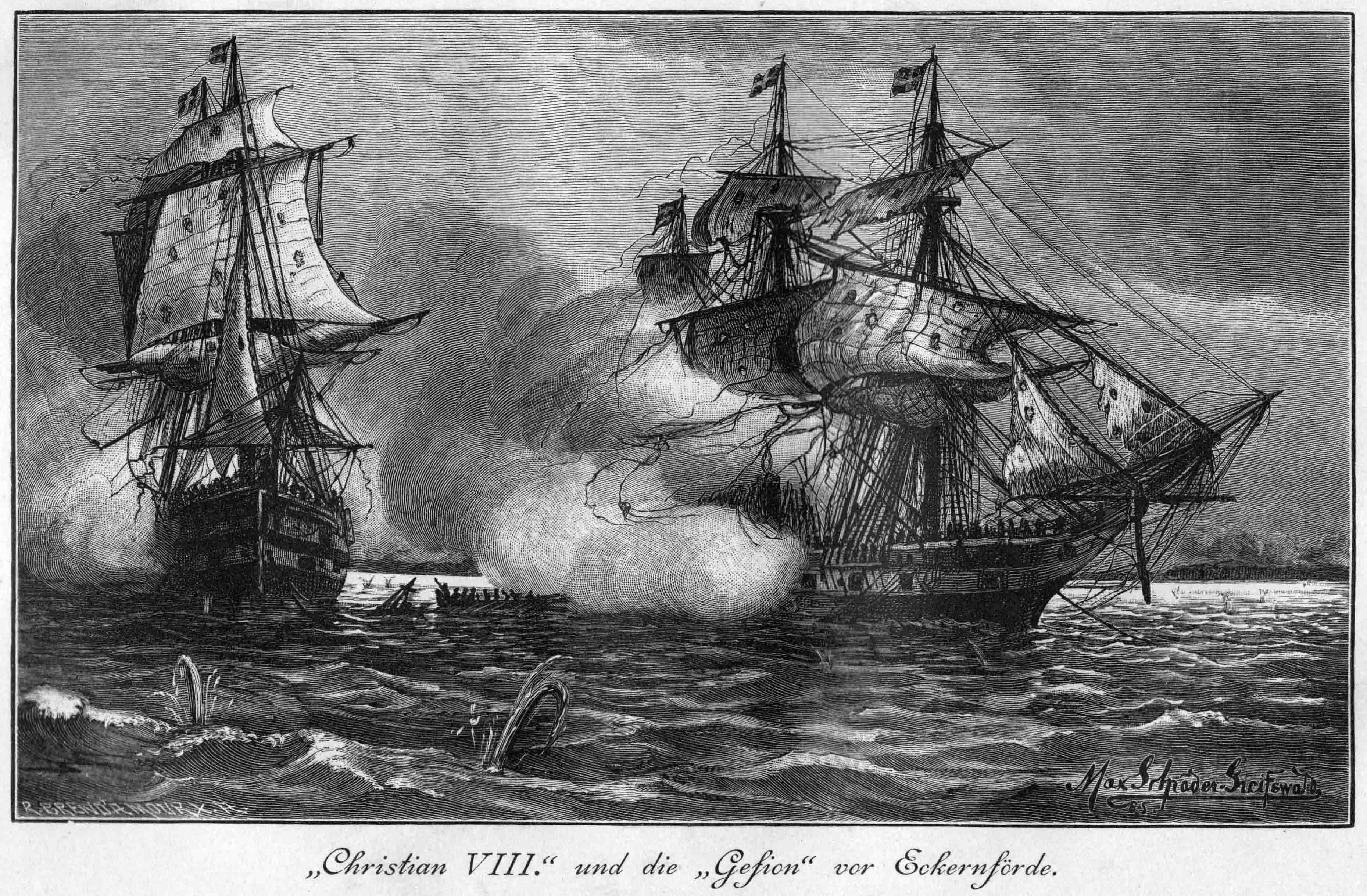 "Christian VIII" und die "Gefion" vor Eckernförde. Darstellung von Max Schröder-Greifswald von 1885 aus dem Buch: "Erinnerungen und Bilder aus dem Seeleben" von Reinhold Werner, Berlin 1886